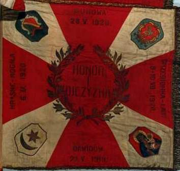 Sztandar 16 Pułku Piechoty Ziemi Tarnowskiej (strona lewa)